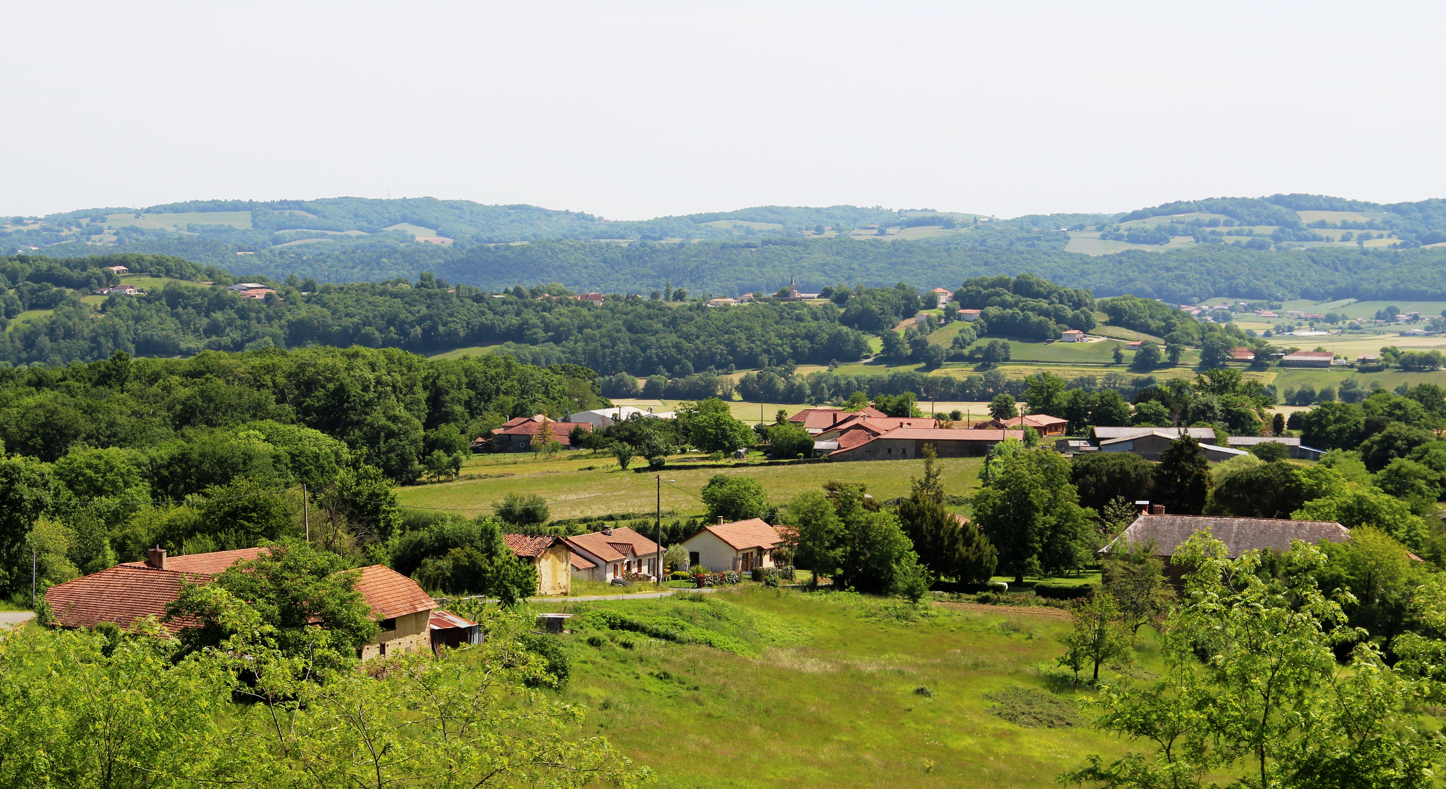 Bouilh-Péreuilh (Hautes-Pyrénées)